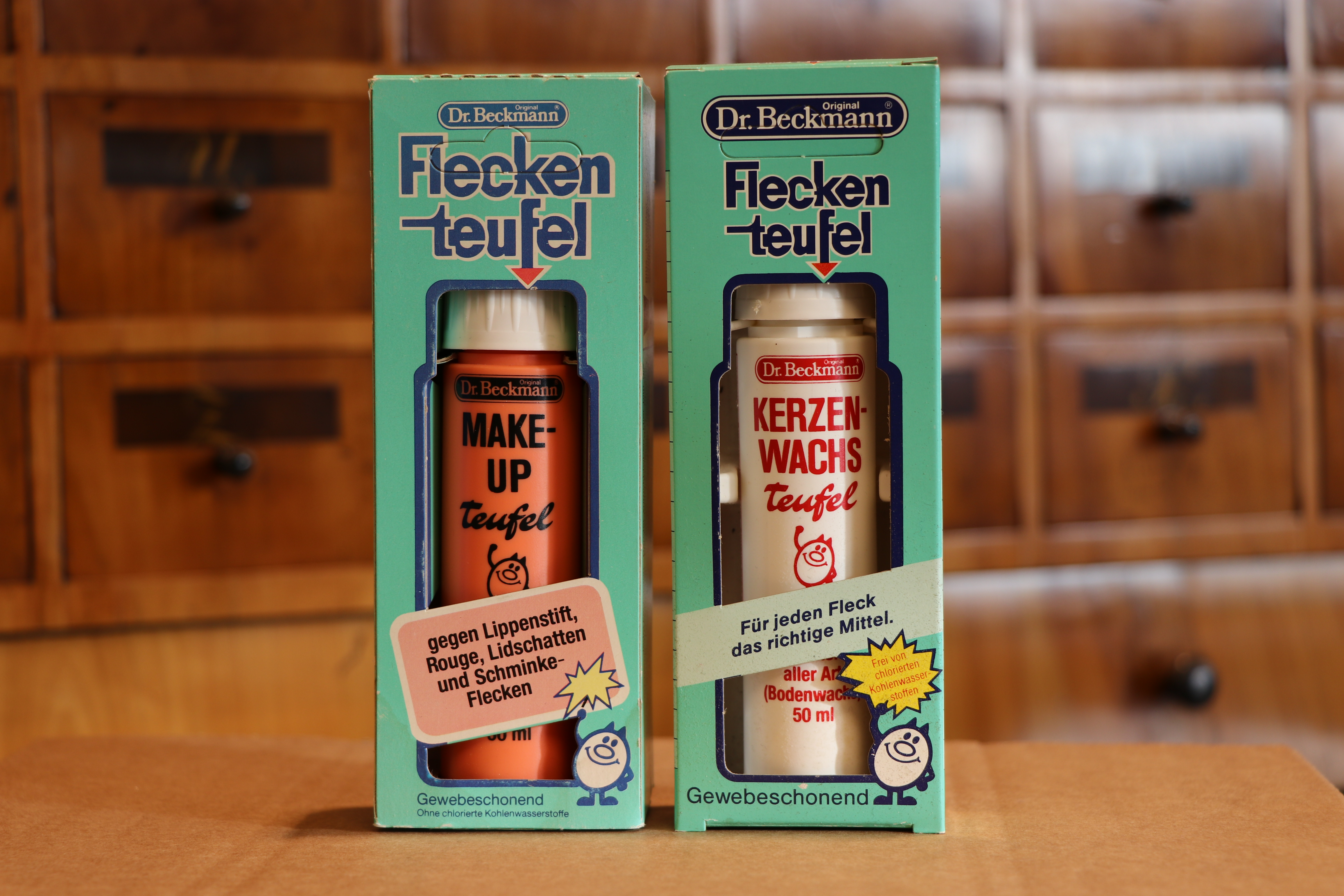 Die Fleckenteufel